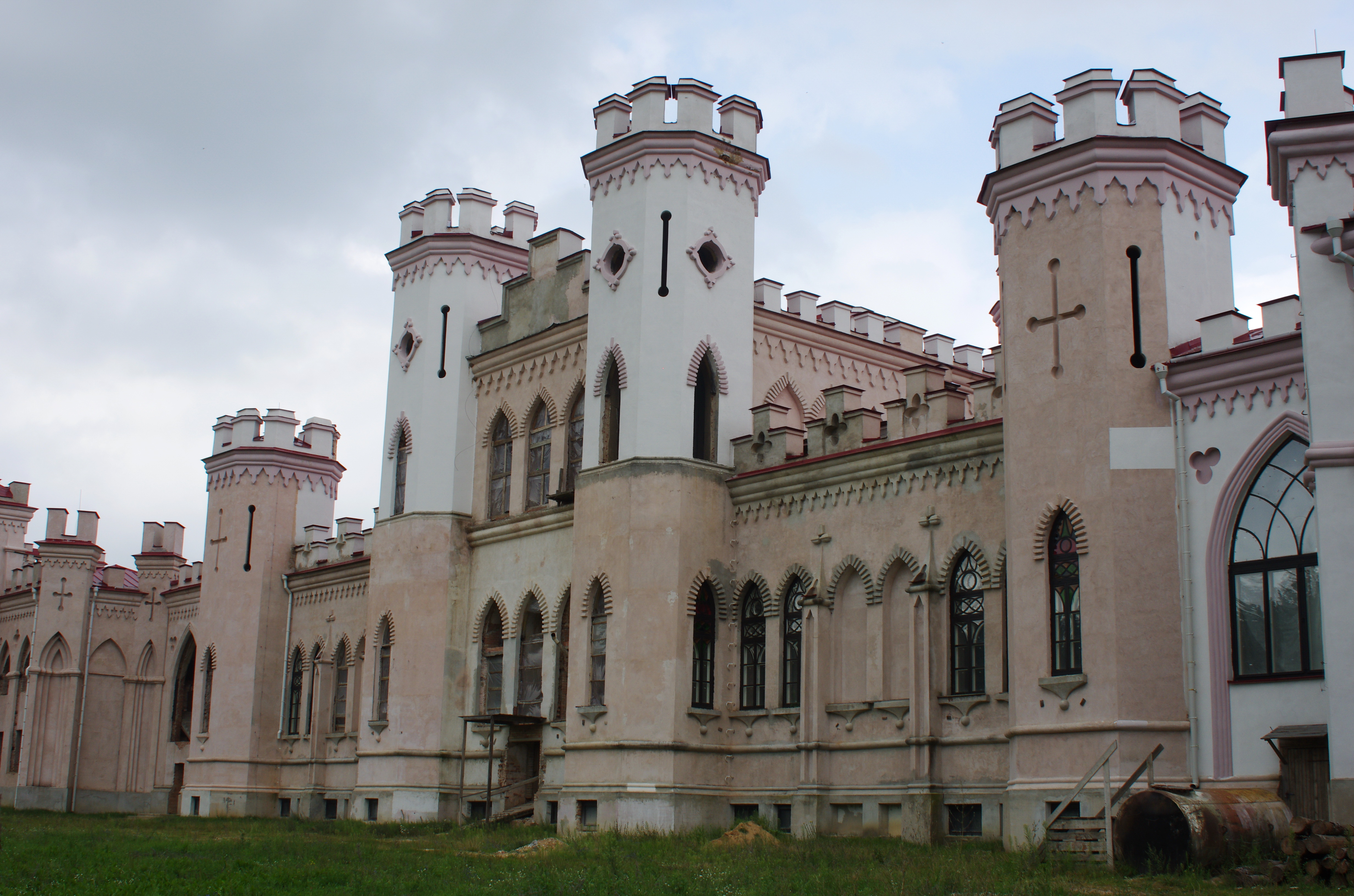 Палац Пуслоўскіх